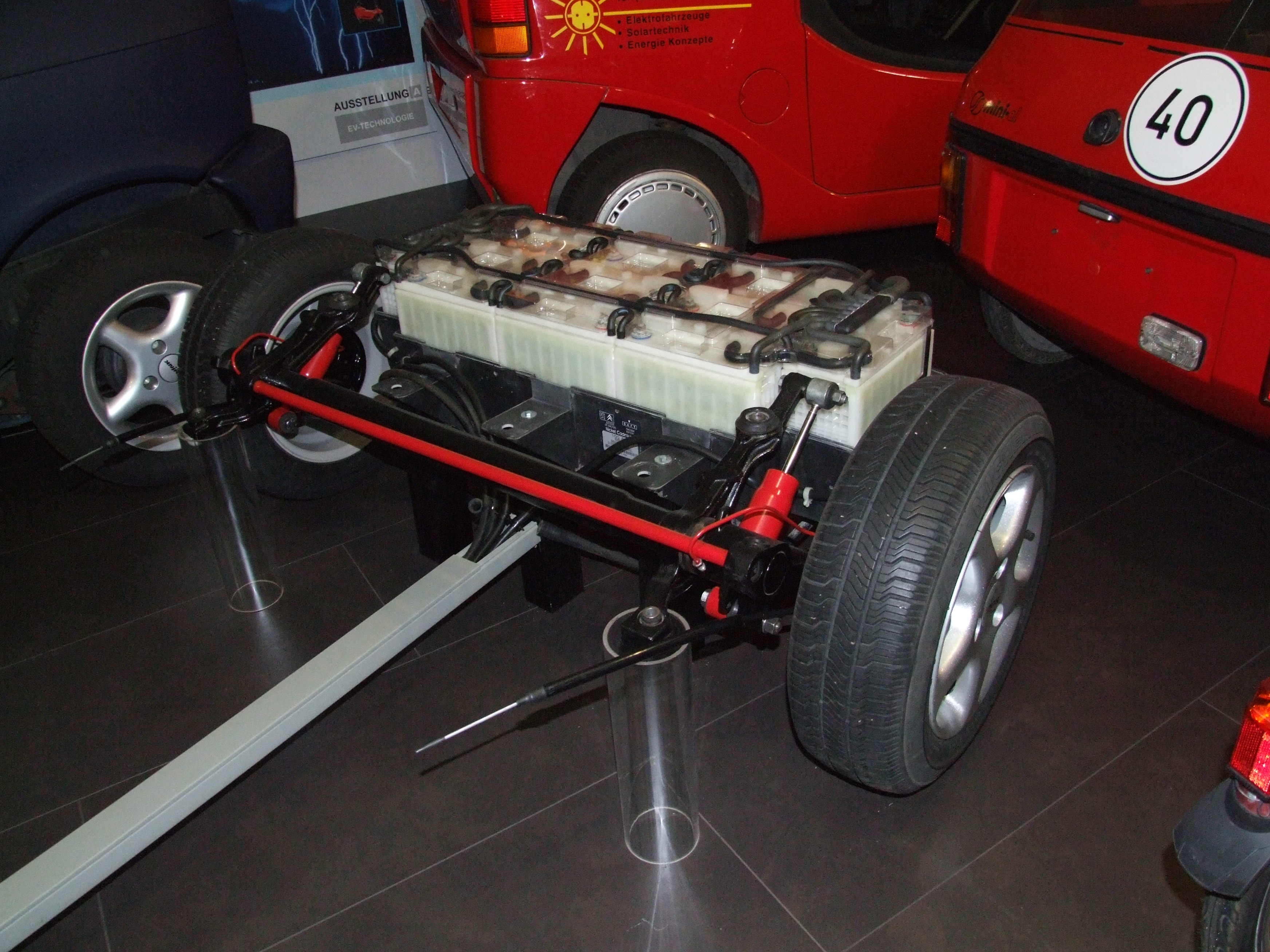 Nickel Cadmium Batterie, 120 Volt, 100 Ah, 300 kg, von PSA